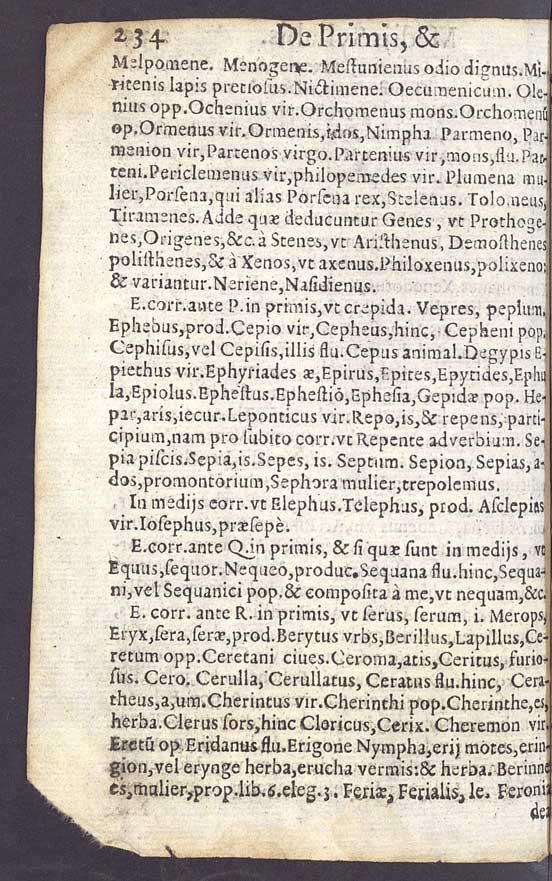 Anonymous & institutione grammaticae liber quintus [de Syllabarum quantitate ac versificandi ratione . Europeana. Retrieved on 2015-09-27.